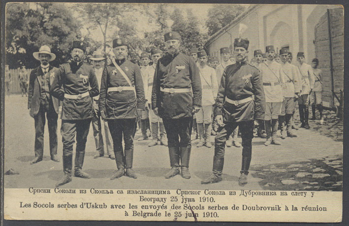 Картичка с изобразени скопски сръбски соколи - дейци на Соколската организация „Кралевич Марко“.